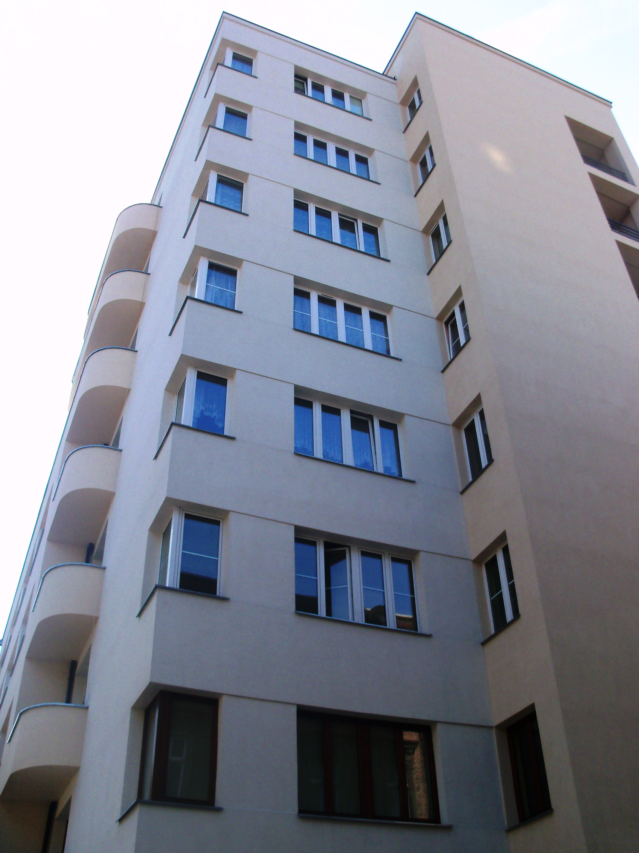 Budynek przy ul. Wojeódzkiej 23 w Katowicach - dawny dom profesorów Śląskich Technicznych Zakładów Naukowych